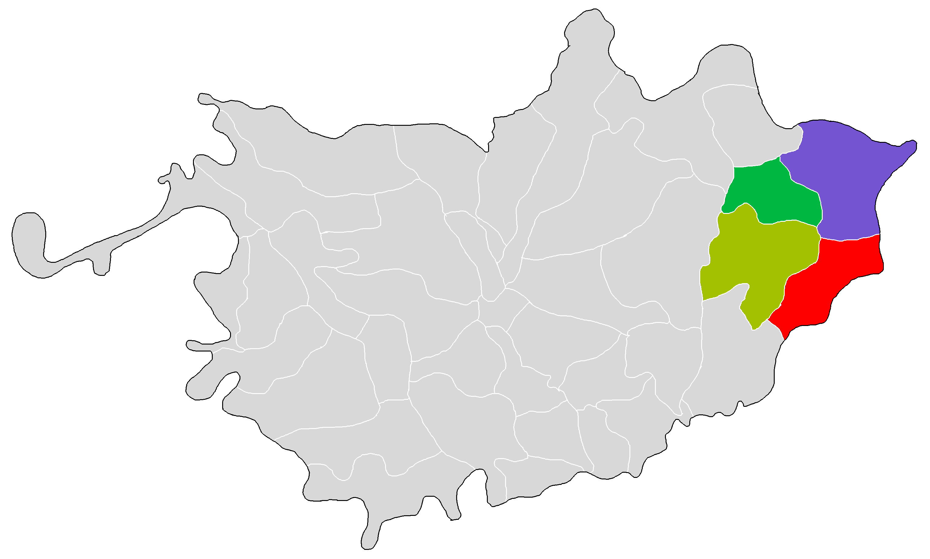 中文（中国大陆）: 1825年的东平州地图。上色者为今接山镇分属的四个保。